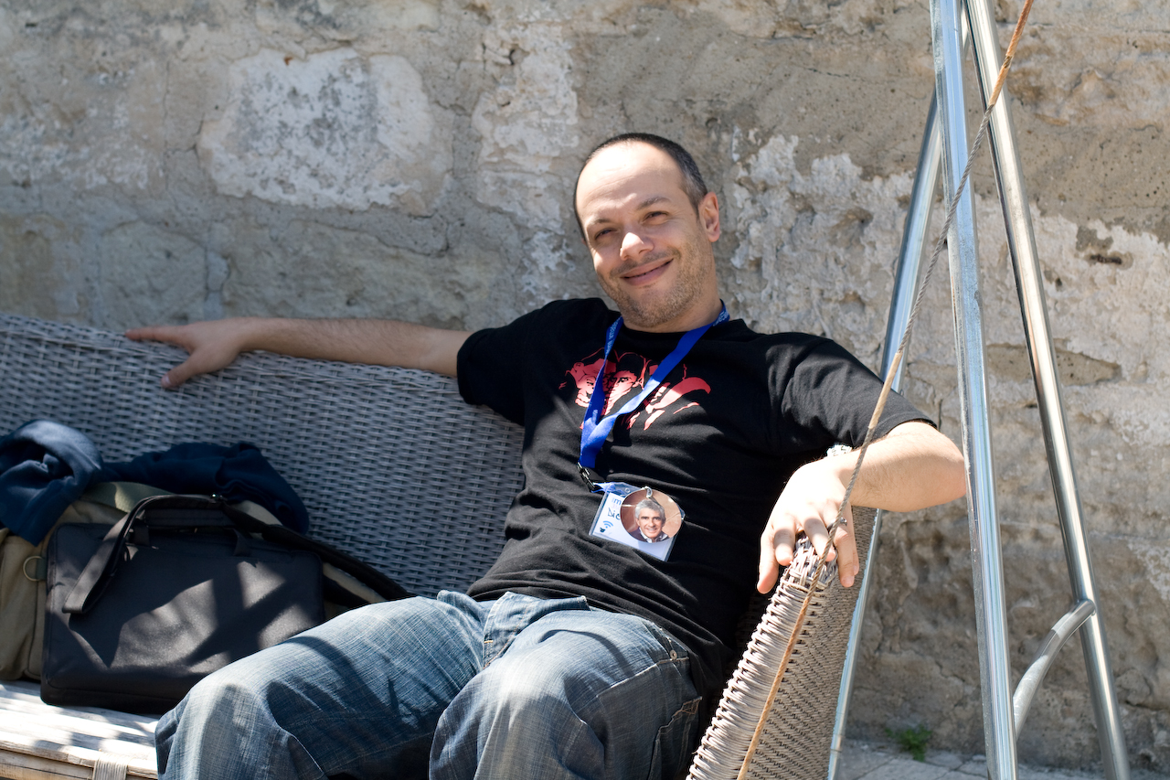 Matera, 2 maggio 2008. Il conduttore televisivo, attore e regista italiano Diego Bianchi al Materacamp 2008.